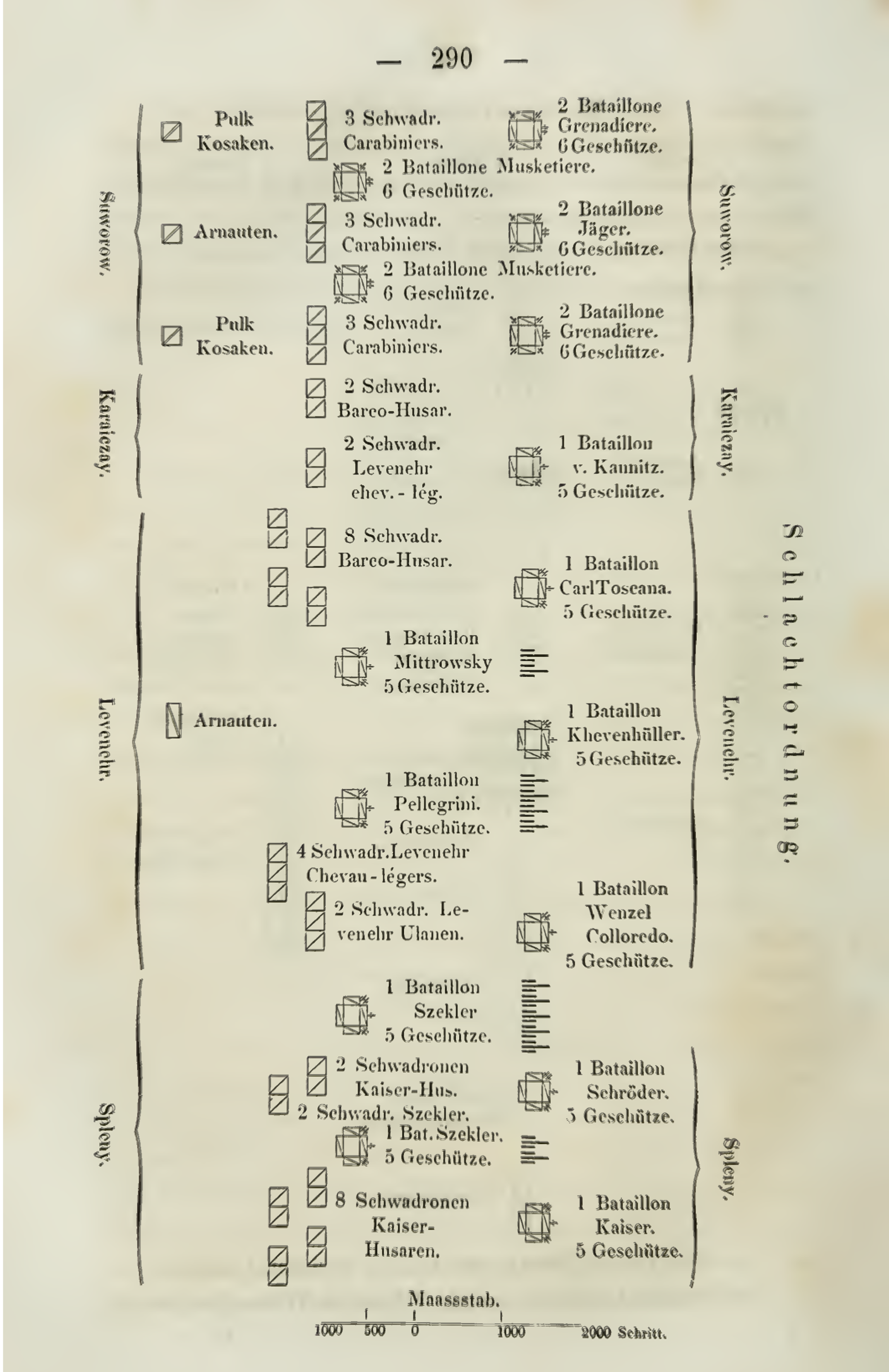 Ordin de lupta focsani